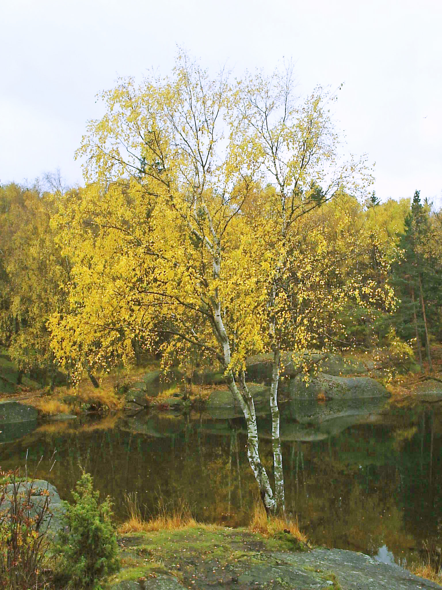 Gulfärgad björk vid Bergsjön, Göteborg. Bilden fotograferad den 23 oktober 2005 av Harri Blomberg.